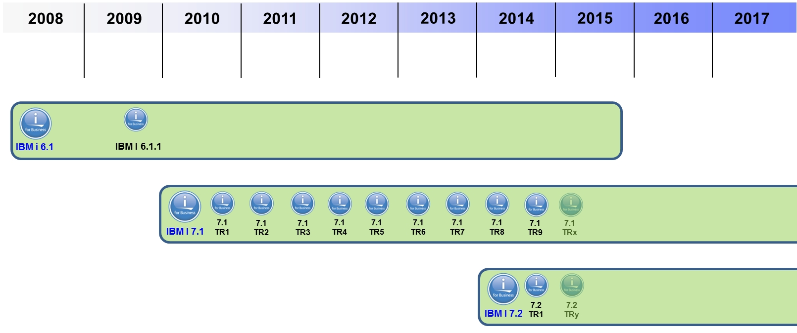 Roadmap IBM i (2014-10)